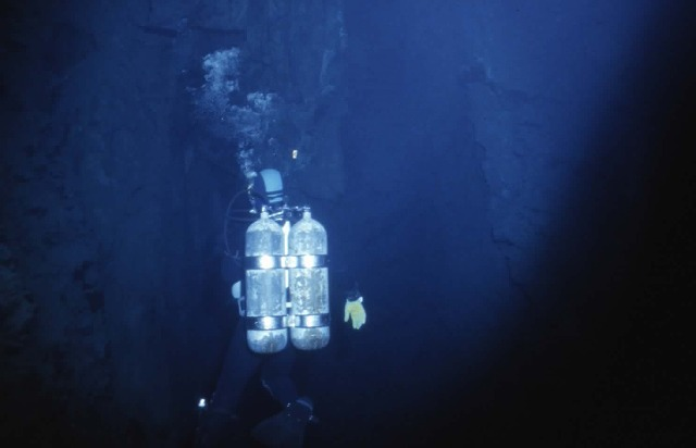 1981年岩手県龍泉洞 12ℓダブルタンクBCを使わず潜水